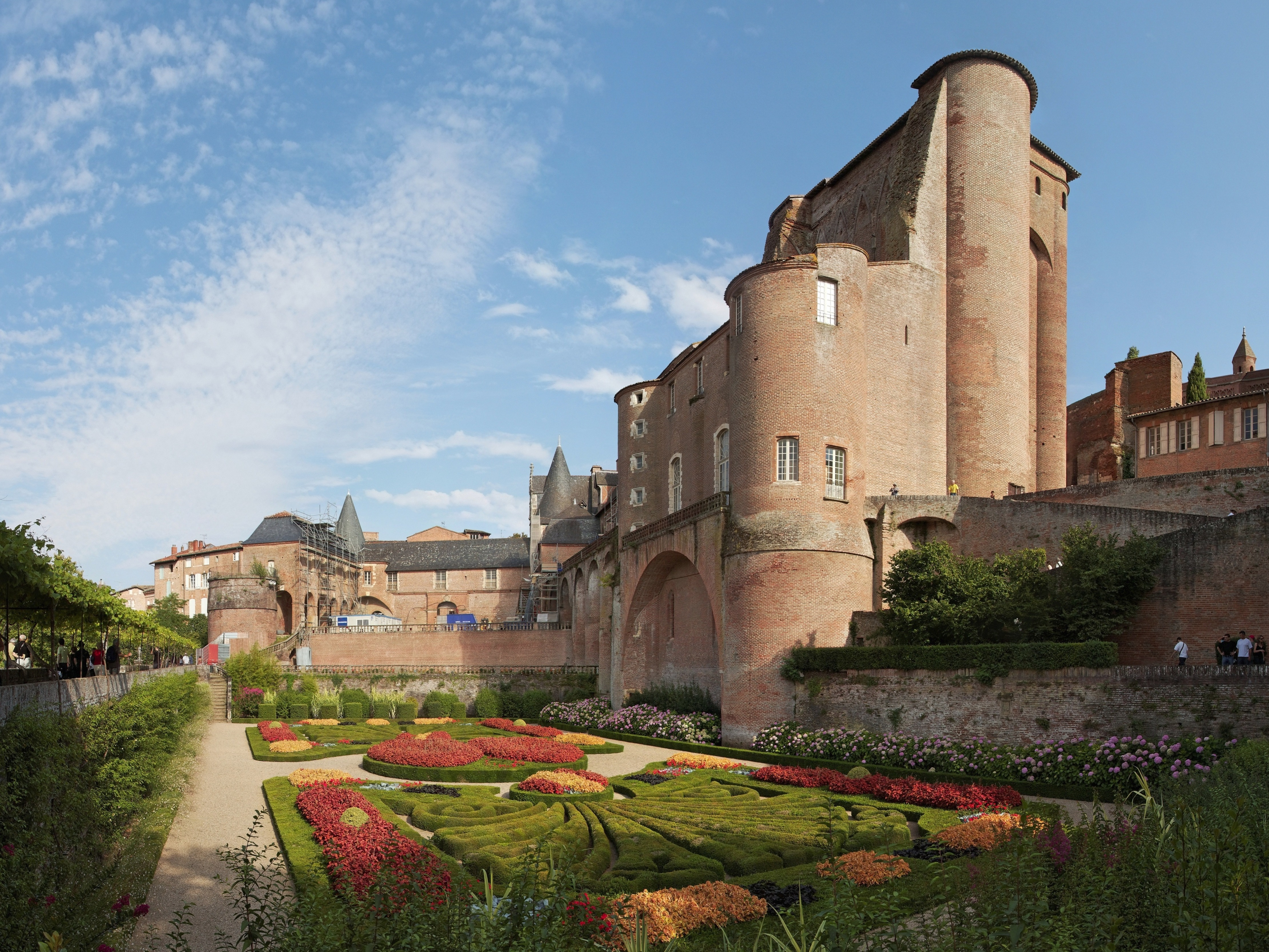 Albi Palais de la Berbie PA00095480 .